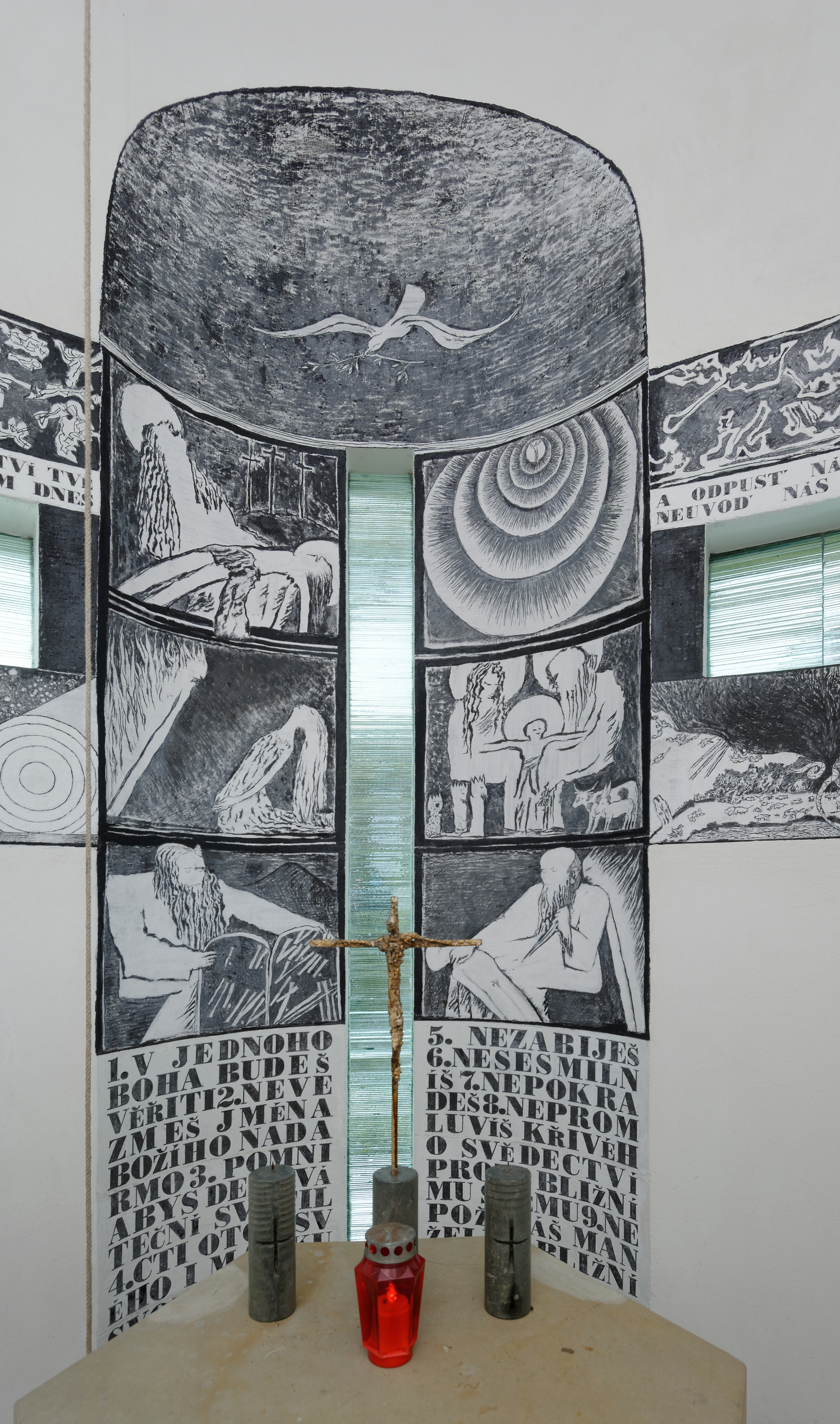 Kaple svatého Václava v Bílce, interiér. Výzdoba Jan Koblasa a Sofia Jakuševa-Koblasová (písmo).